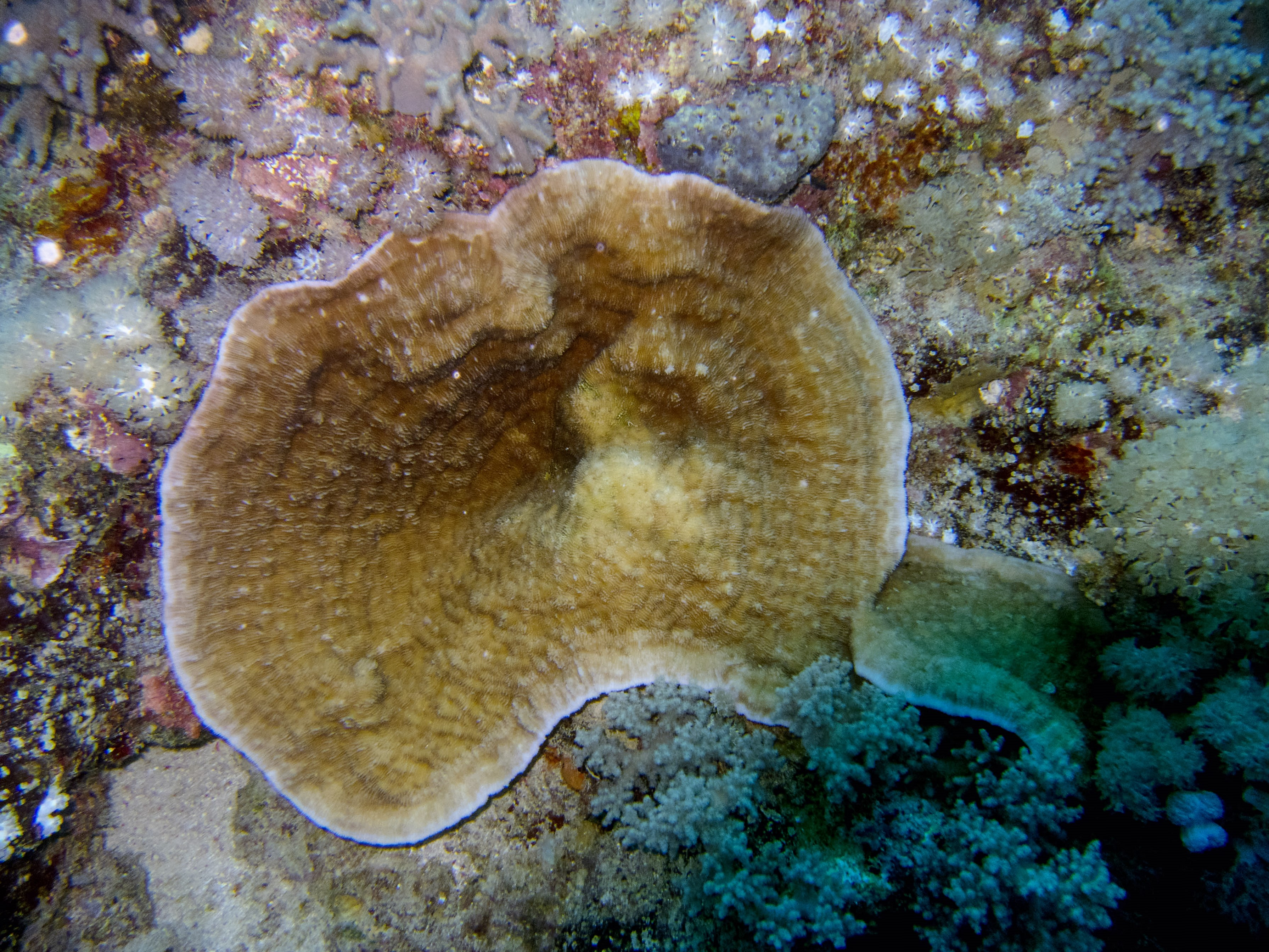 Podabacia sinai, Arabia Saudí, mar Rojo.